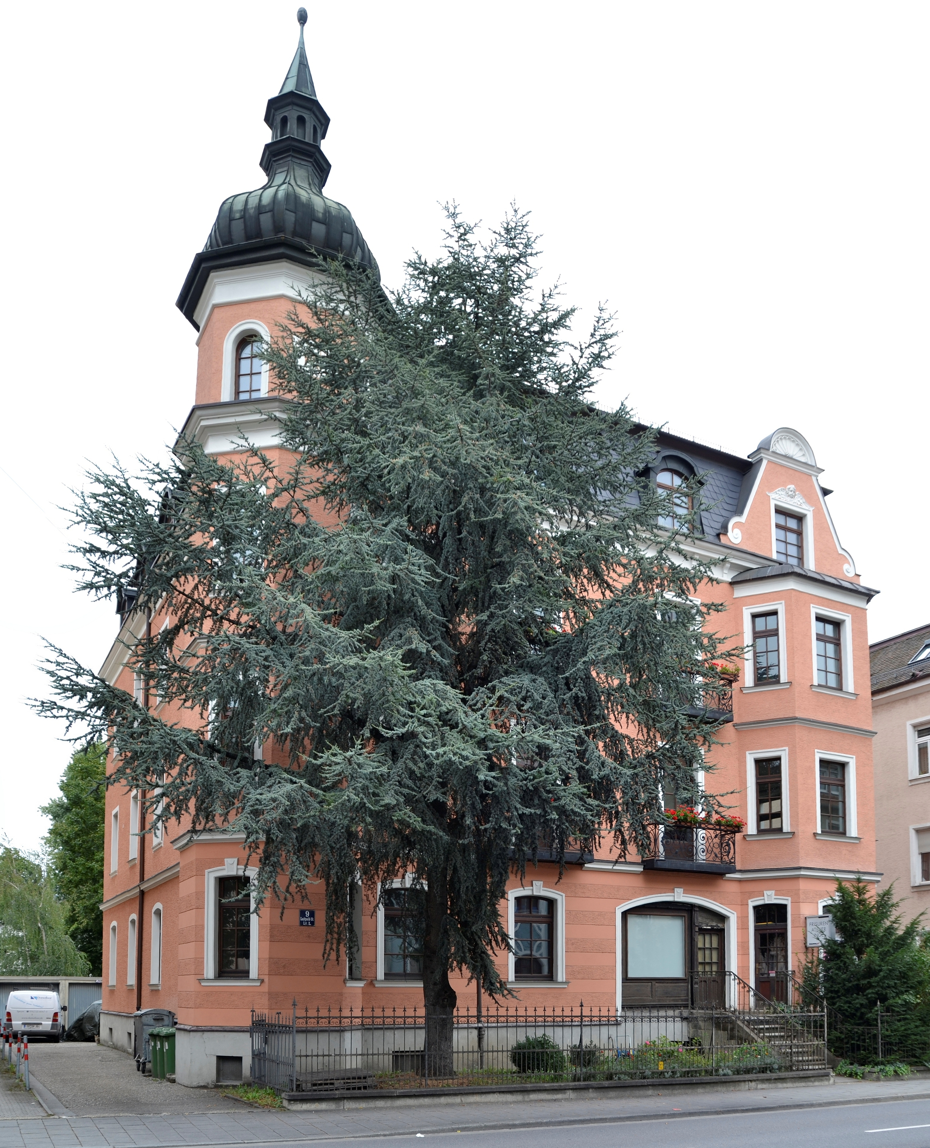 Das Gebäude "Luitpoldstraße 9" in Regensburg, Bayern.